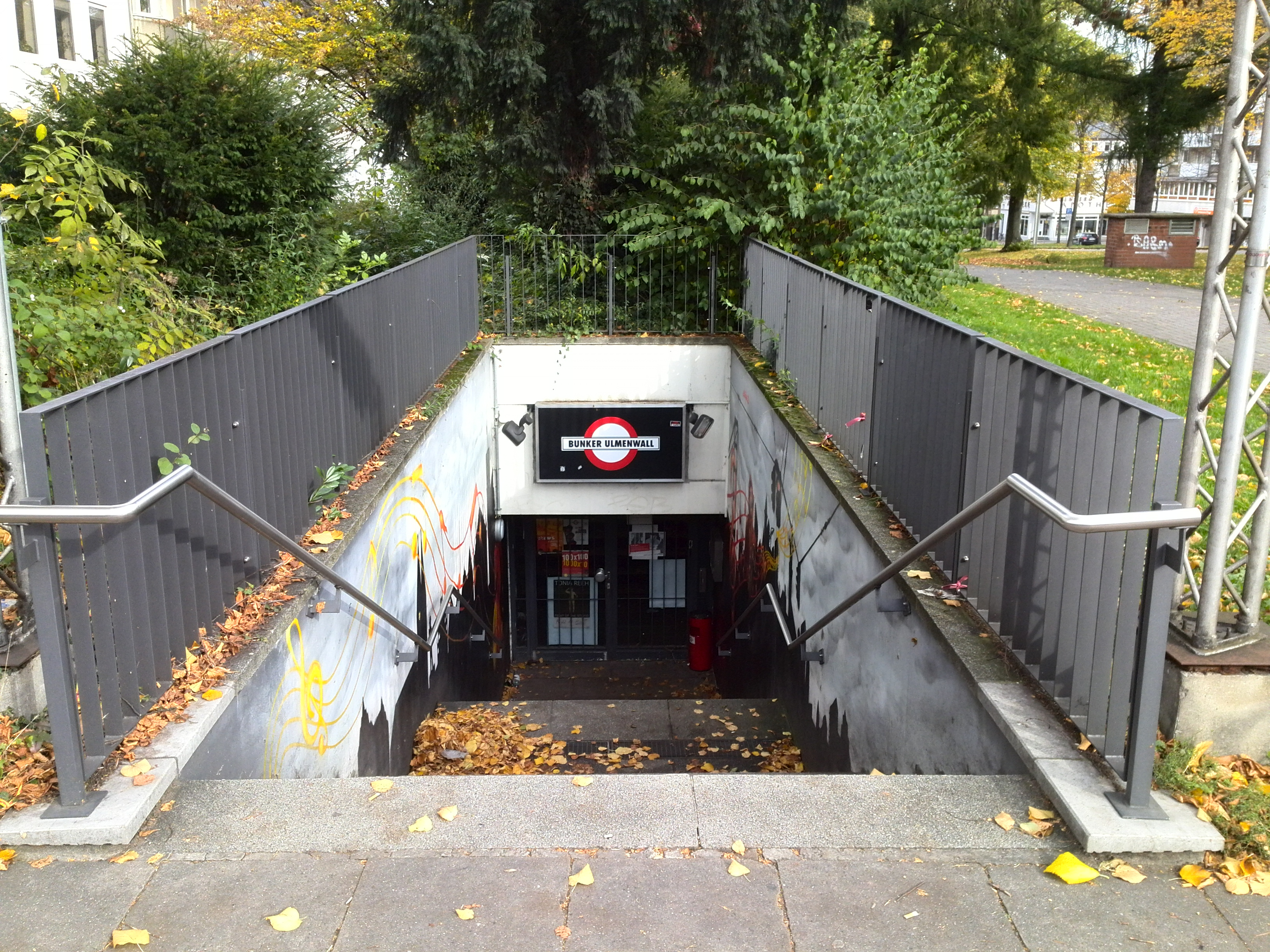 Dies ist der Eingang zur Kultureinrichtung "Bunker Ulmenwall" in Bielefeld.